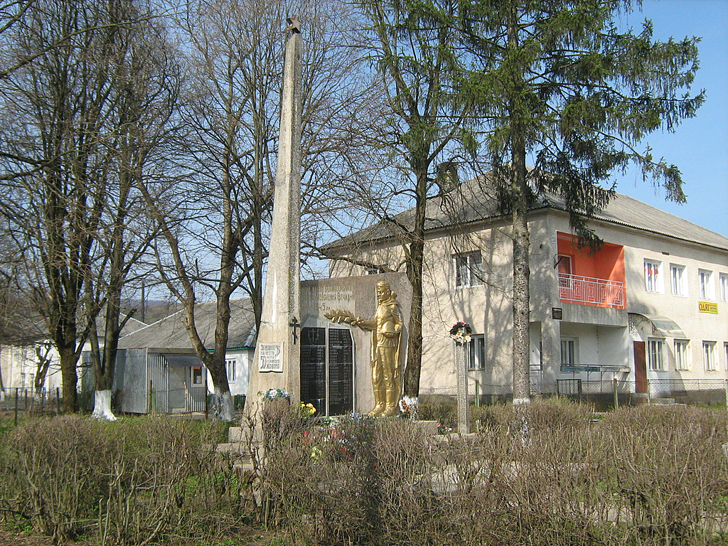 Памятник односельчанам, погибшим в годы Великой Отечечственной войны в с.Керецки